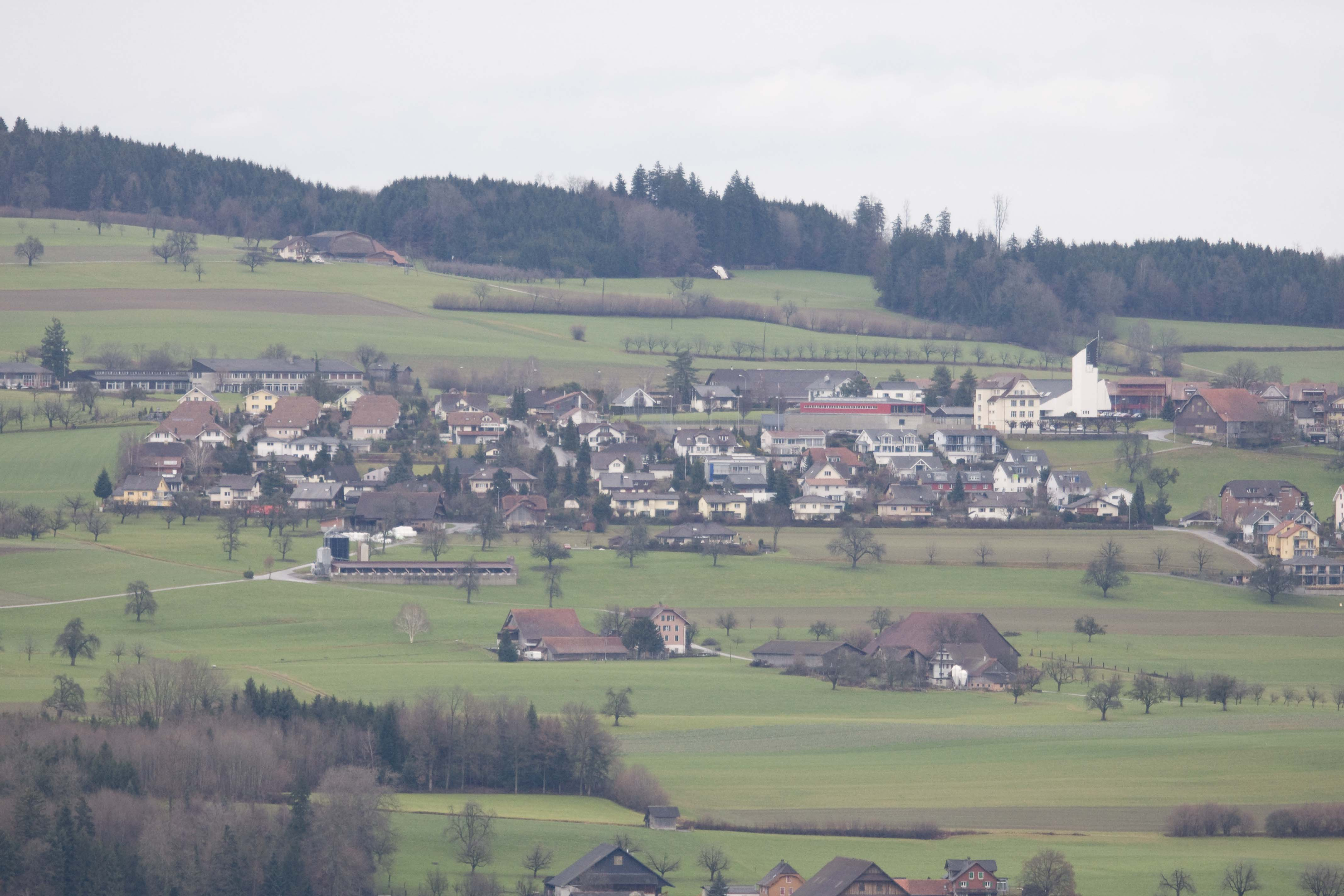 Hohenrain mit Kommende